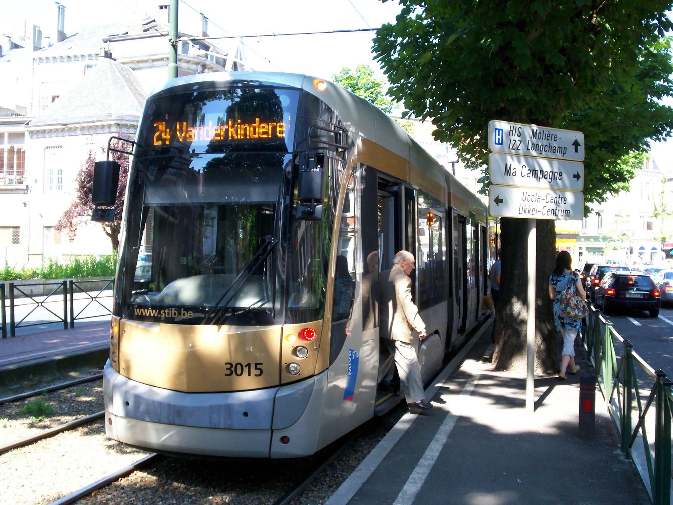 T3000 de la ligne 24 au terminus de Vanderkindere